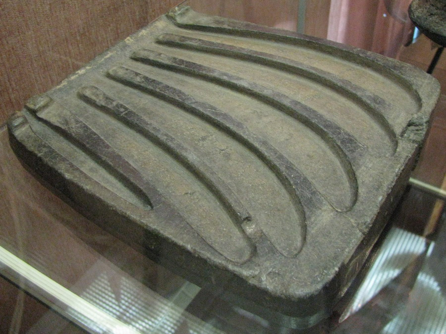 Литейная форма для отливки 5 серпов.XVIII — XVII в. до н.э. Бронзовый век. Из коллекции Свердловского областного краеведческого музея.